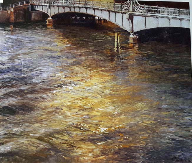 Die Weidendamm Brücke, 2004, 55 x 65 cm, Öl auf Leinwand, sign. u.r. "Timner 2004"